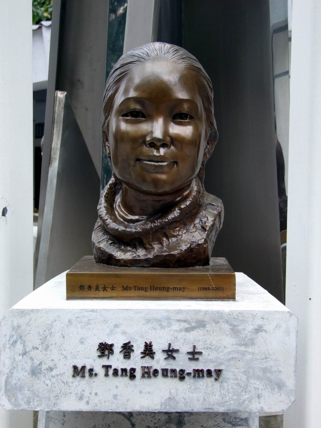 中文（香港）: 位於香港公園抗疫英雄紀念碑的鄧香美女士銅像